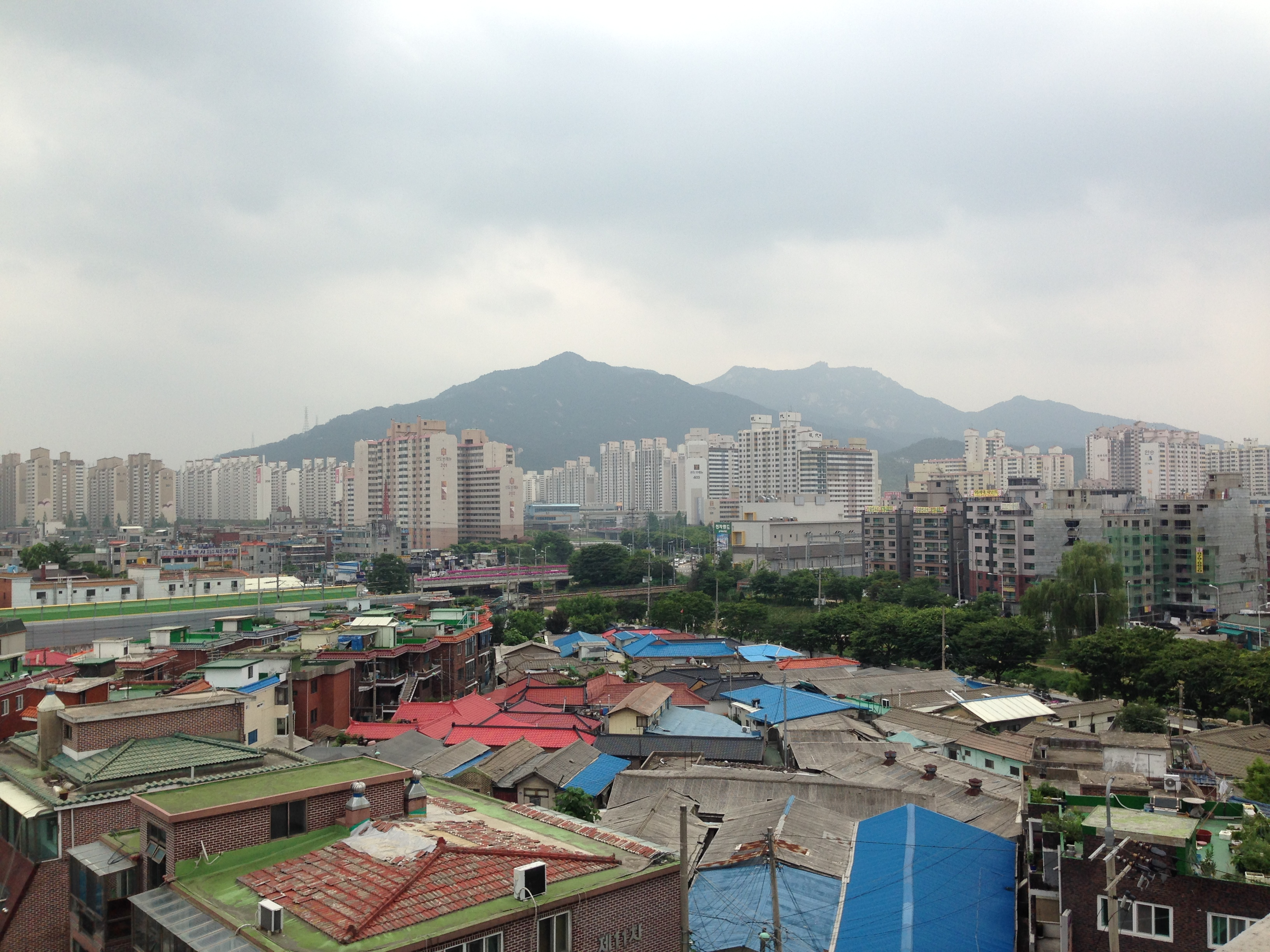 의정부시 화룡역 부근 전경